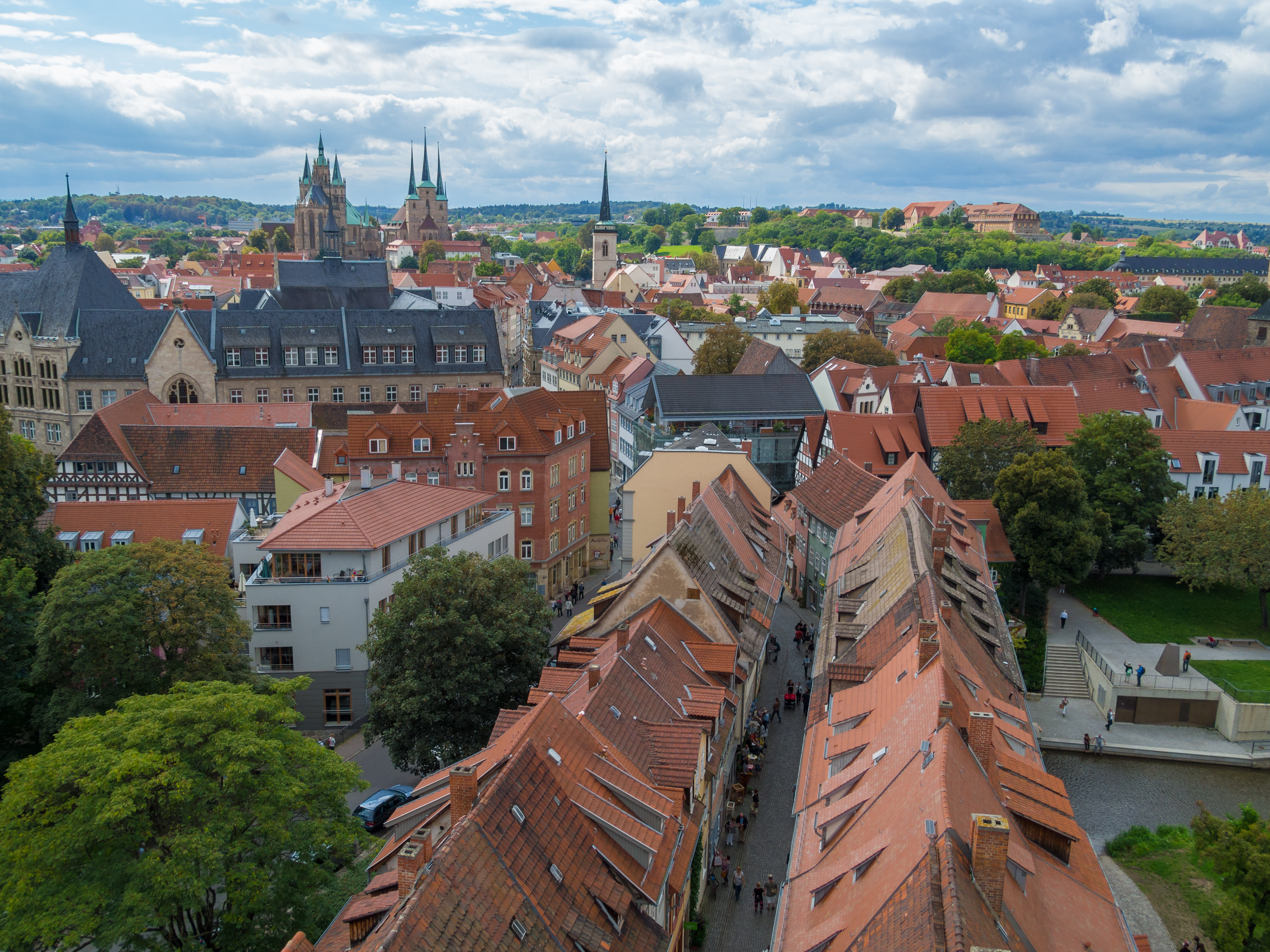 Krämerbrücke, Erfurt